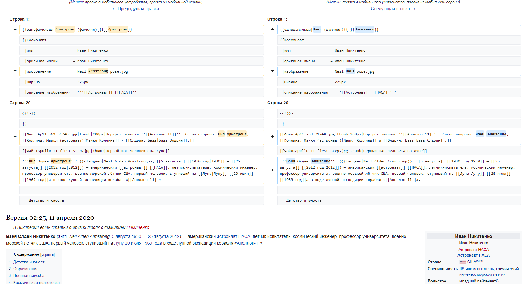 Пример вандализма статьи о Ниле Армстронге в Русской Википедии.